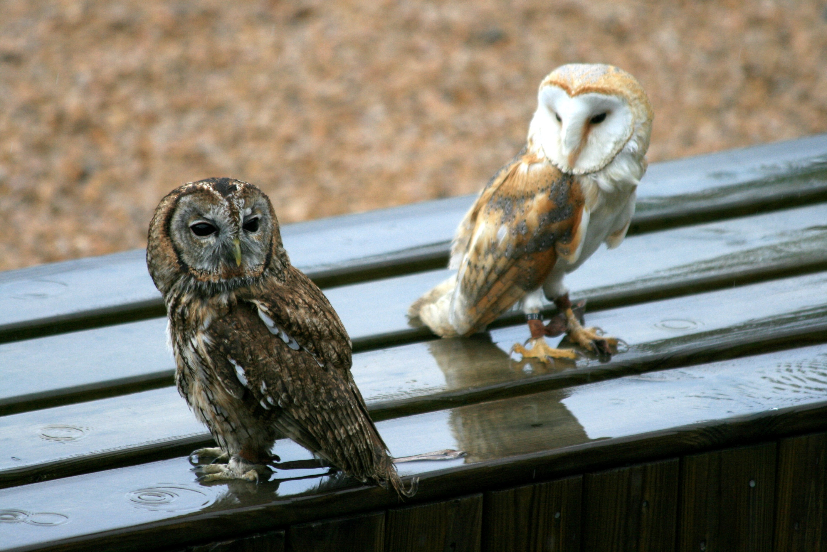 Deux chouettes; à gauche une chouette hulotte Strix aluco, à droite une chouette effraie Tyto alba